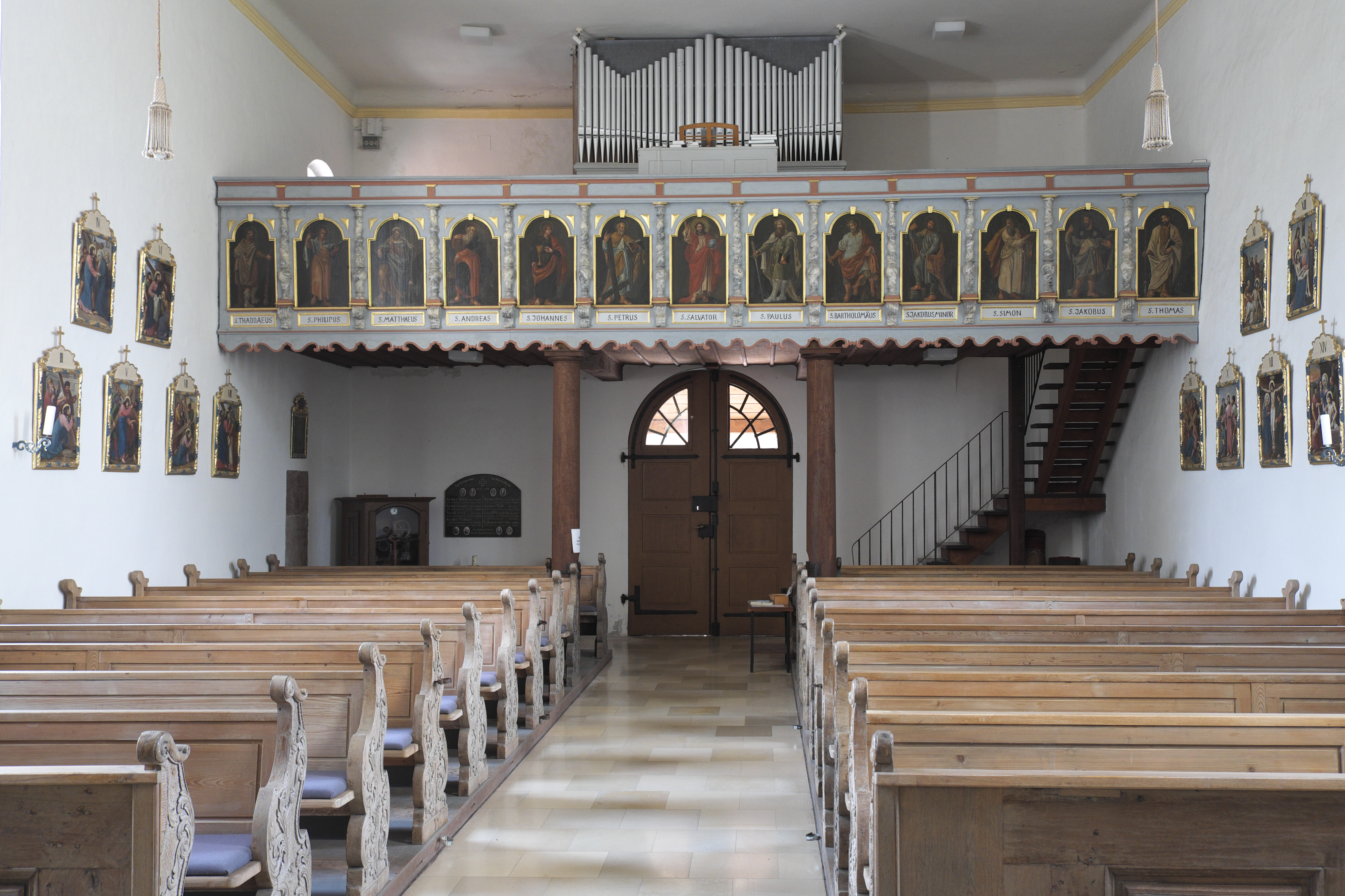 Katholische Filialkirche St. Peter und Paul in Holzkirchen (Alling) im Landkreis Fürstenfeldbruck (Bayern/Deutschland), Orgelempore